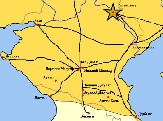 Примерная карта караванных дорог, проходящих через древний Маджар (по Э.В.Ртвеладзе, 1974 год)